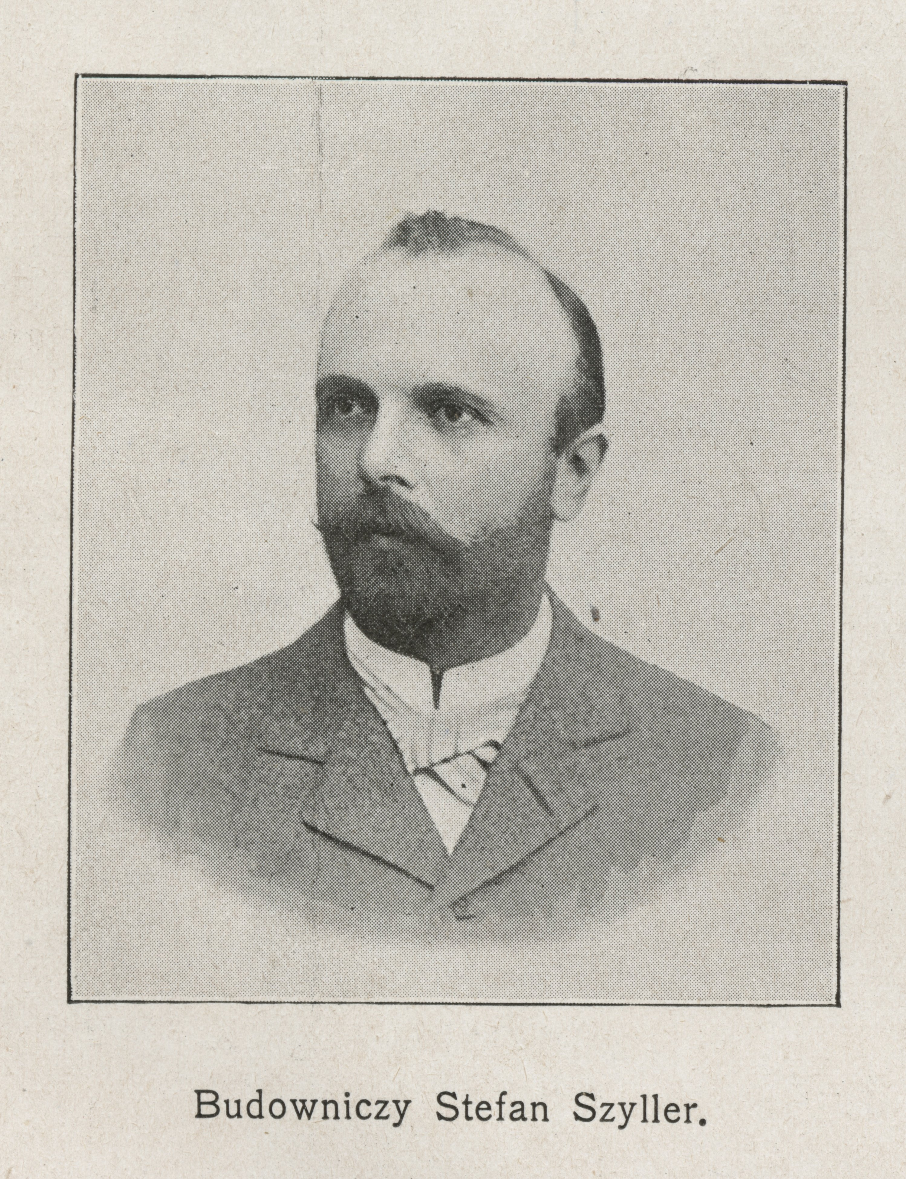 Budowniczy Stefan Szyller